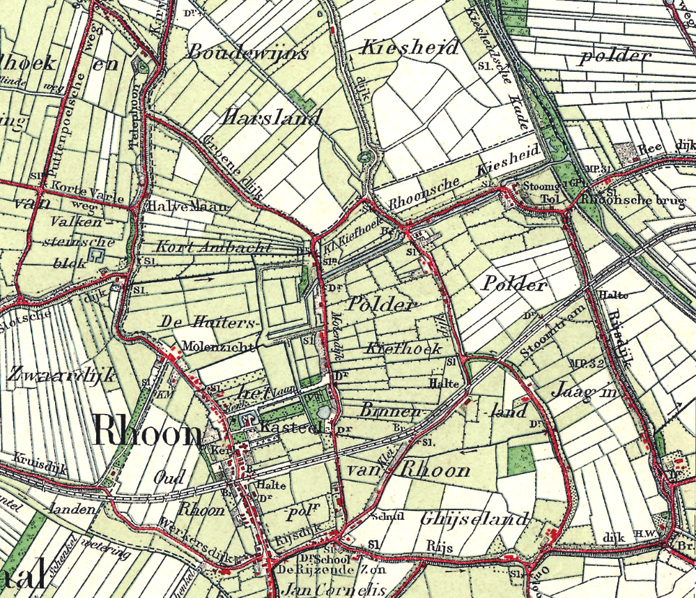 Fragment van topografische kaart schaal 1:25.000 rond Rhoon. Dit is een gedeelte van de kaart nr. 37G uit 1910. Auteursrechten voorbehouden aan de Staat der Nederlanden. De kaart is dus nu Publiek Domein vanwege ouderdom.